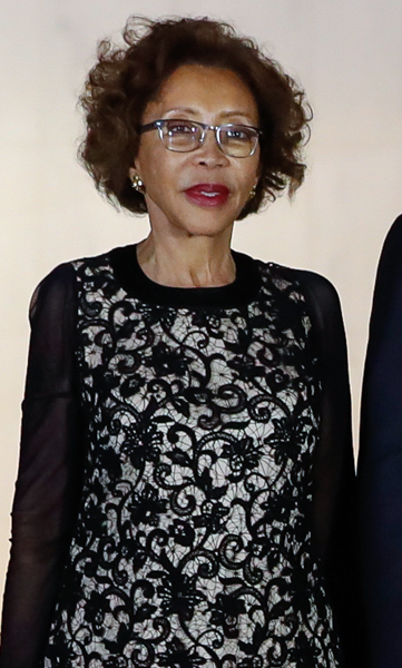 (Brasília - DF, 13/11/2019) Presidente da República, Jair Bolsonaro acompanhado da Primeira Dama, Michelle Bolsonaro recebem o Presidente da República da África do Sul, Cyril Ramaphosa e Senhora Tshepo Motsepe. Foto: Alan Santos/PR